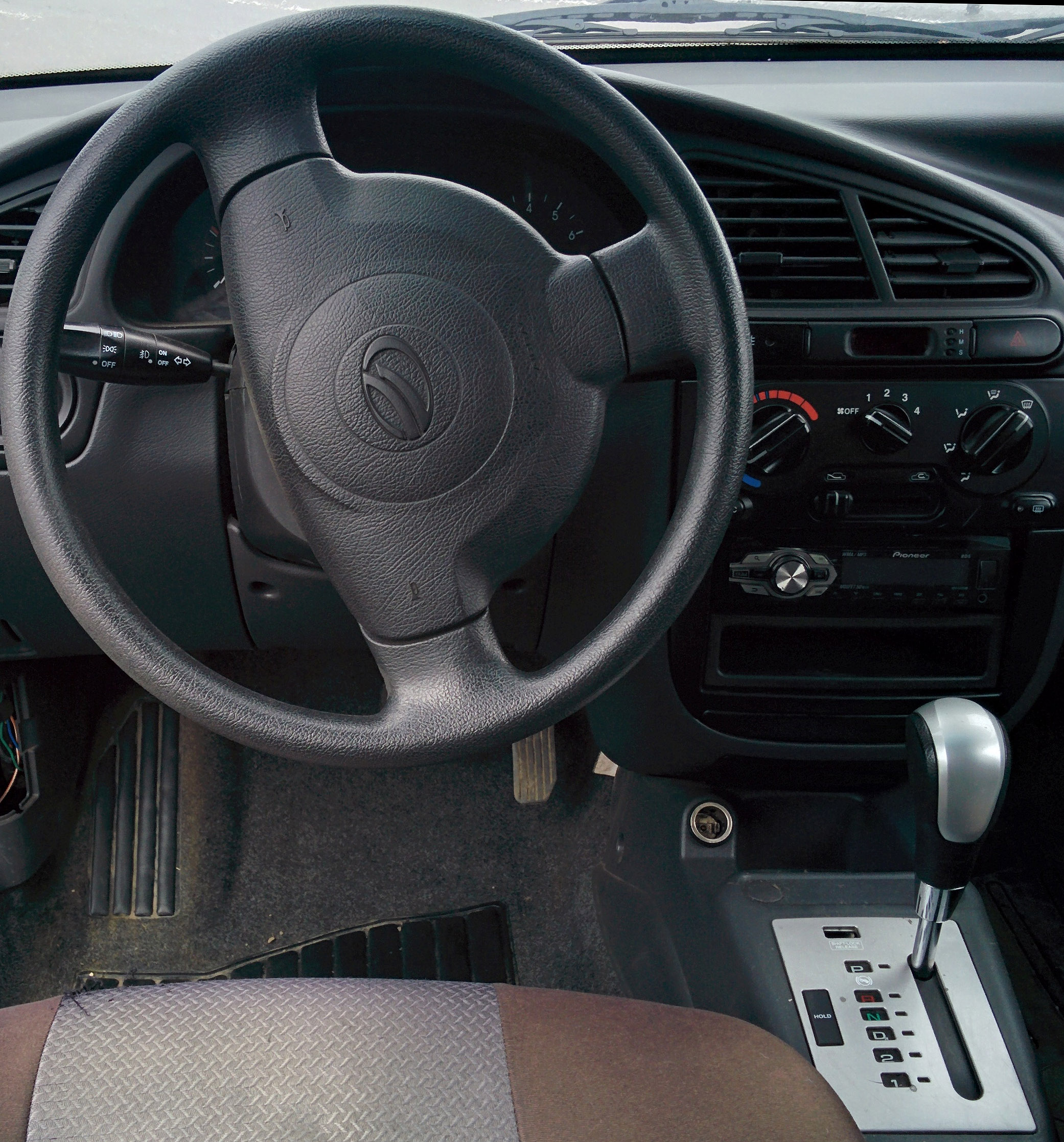 Zaz Lanos T150 1.4i AT (TA69W0)